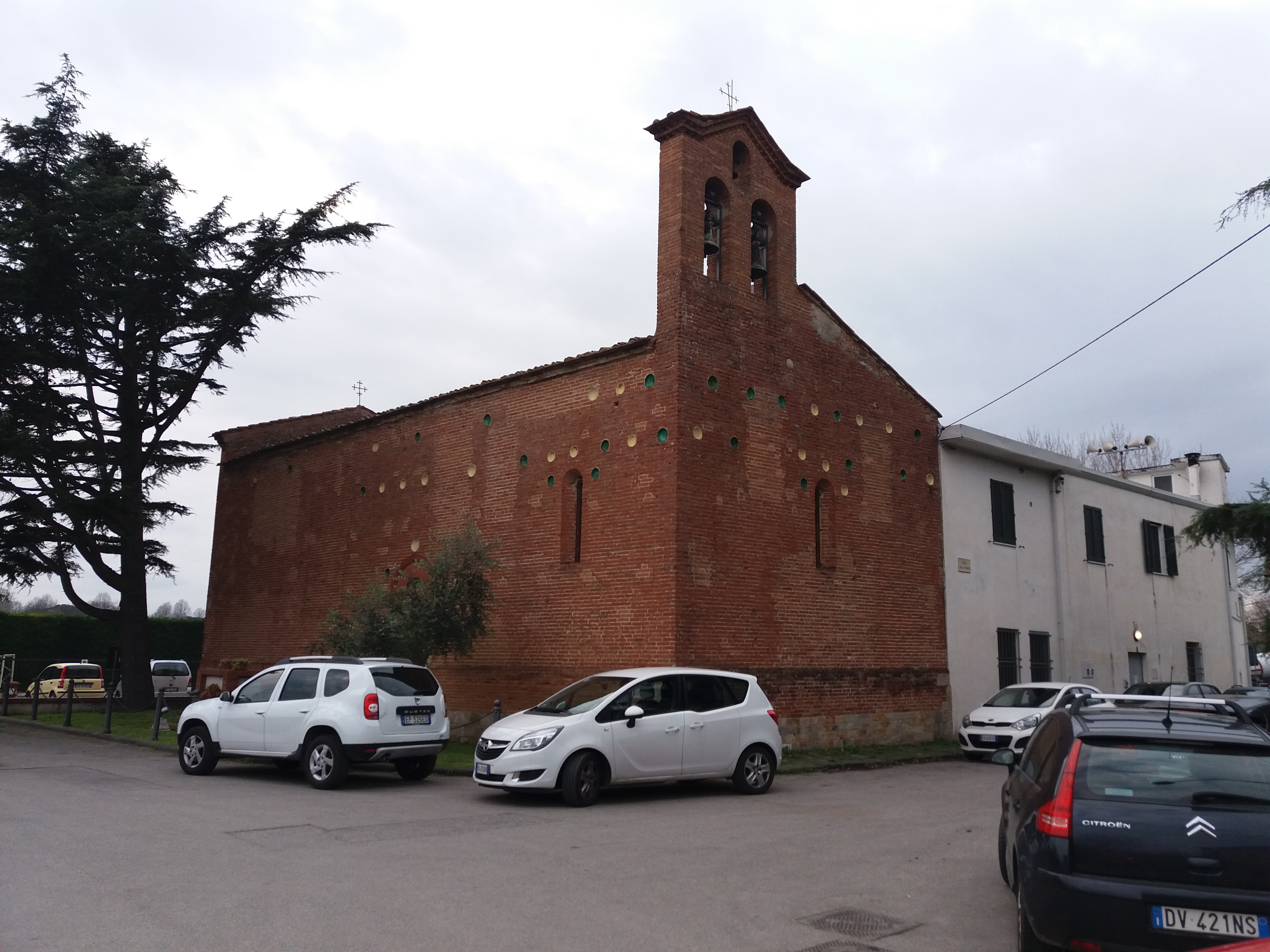 San Biagio, fianco e campanile, Pisa.